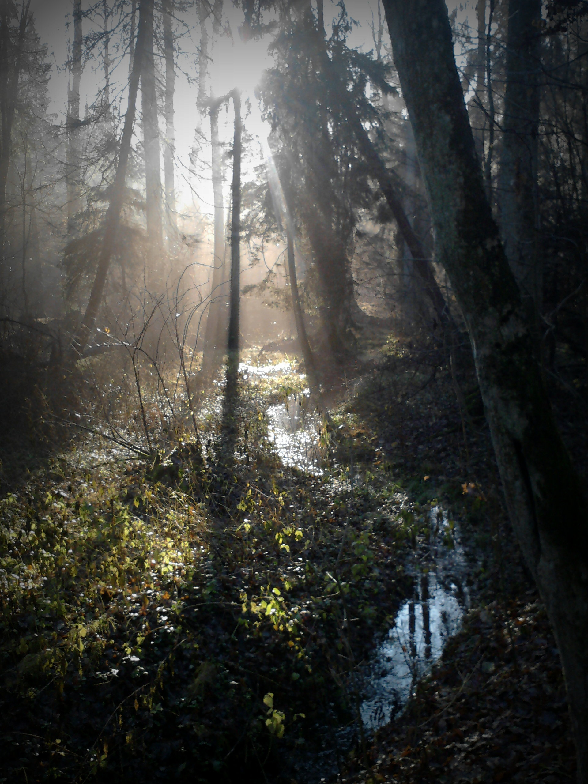 Autor: Adrian Grzegorz 25.11.2012